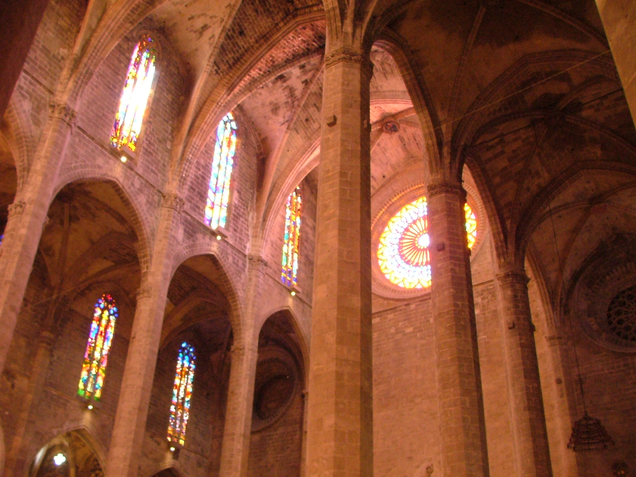 Interior de la Catedral de Palma de Mallorca, Mallorca, Spain